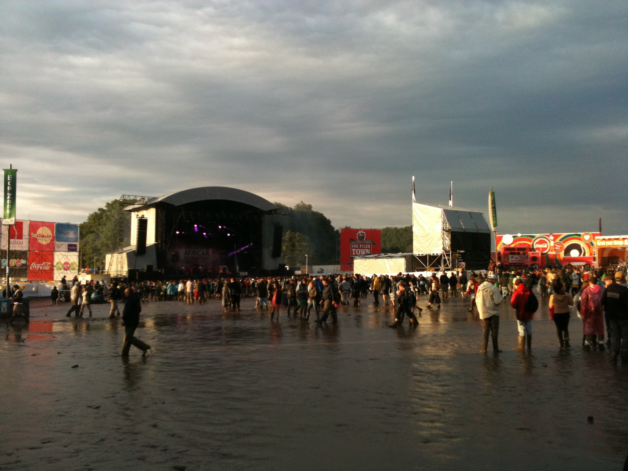 image prise au Dour festival 2012 , face à la Last Arena , la scène principale